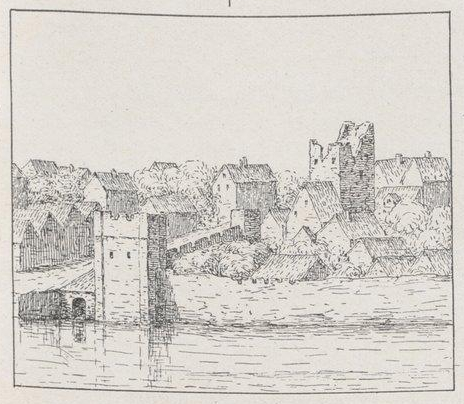 La tour Saint-Antoine et la tour Feu Hugon d'après C. Vischer et H. Piccart (XII° siècle) publié notamment dans : É.G. de Clérambault, La tour Hugon et le château de Tours in Bulletin de la Société archéologique de Touraine (BSAT), tome XVI, L. Péricat, 1907-1908, p. 240, Pl. 1 I